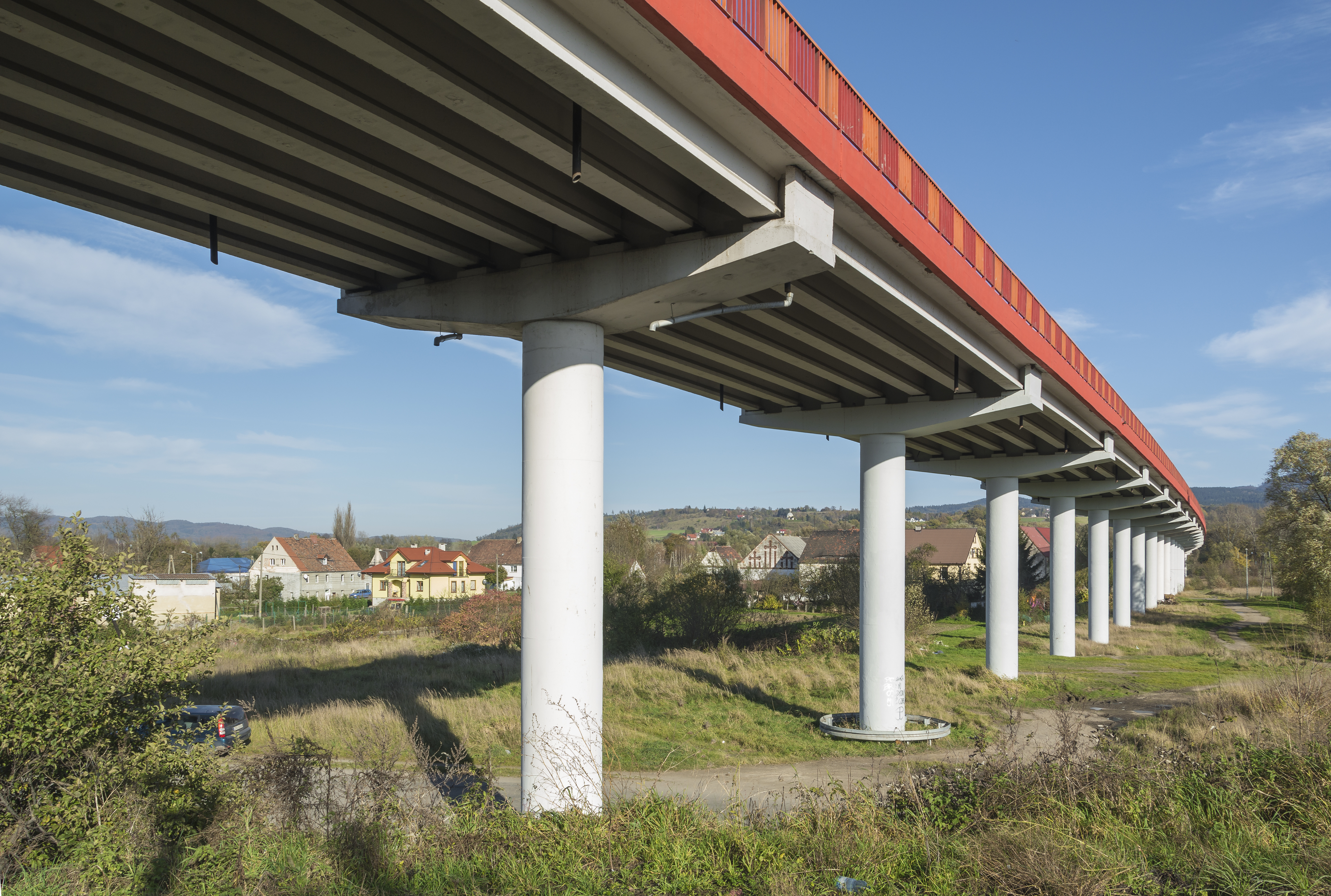 Estakada w Kłodzku